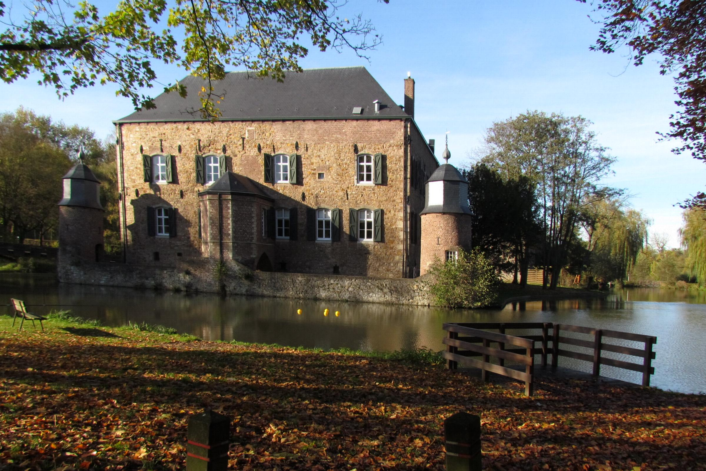 Objekt in der Städteregion Aachen